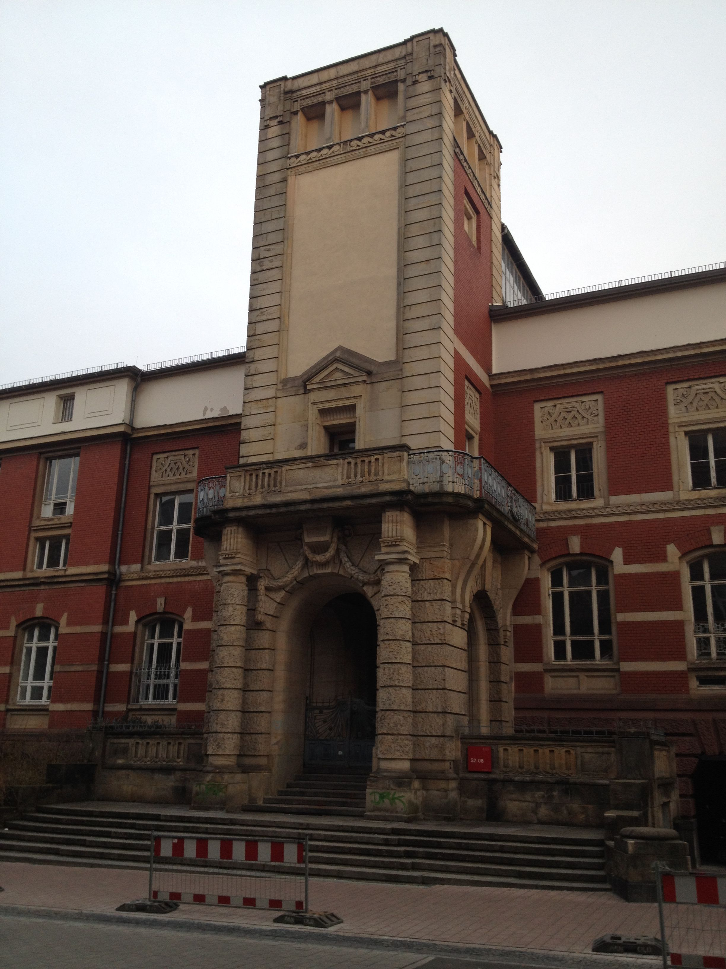 Pützer-Turm in der Hochschulstraße